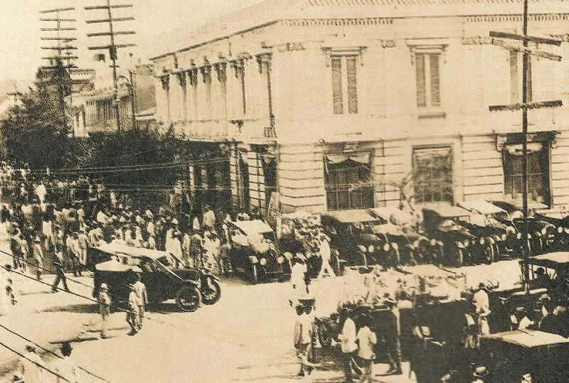 La llamada "Esquina de Mac Gregor", punto de encuentro de los marabinos desde finales del siglo XIX hasta principios del siglo XX.